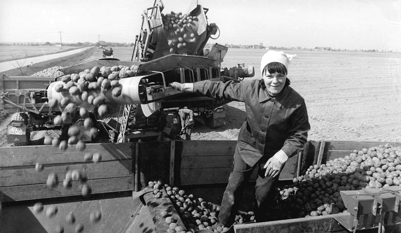 LPG Blönsdorf, Kartoffelernte ADN-ZB Link Mit der Technik auf du und du......steht die 23jährige Bäuerin Hannelore Unruh aus der Landwirtschaftlichen Produktionsgenossenschaft "Friedensbanner" in Blönsdorf im Bezirk Potsdam (unser Foto). Früher mußten die Frauen unter körperlich schweren Bedingungen die Saatkartoffeln in die Erde bringen. Für die Bäuerin der sozialistischen Landwirtschaft erleichtern Maschinen und Geräte die Frühjahrsbestellung auf den Großflächen der DDR. Foto: Link Copyright: ADN-Zentralbild